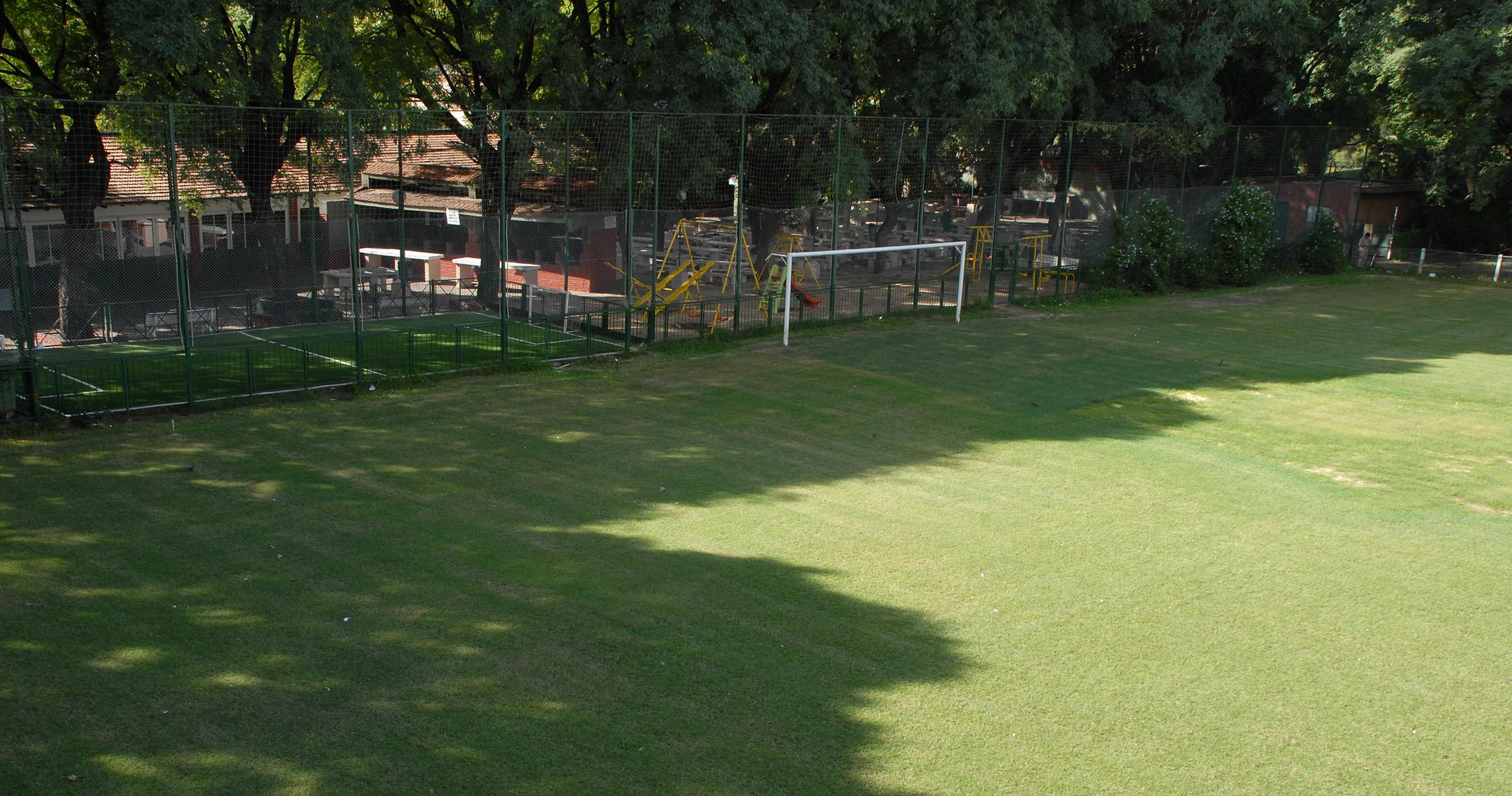 Cancha 2